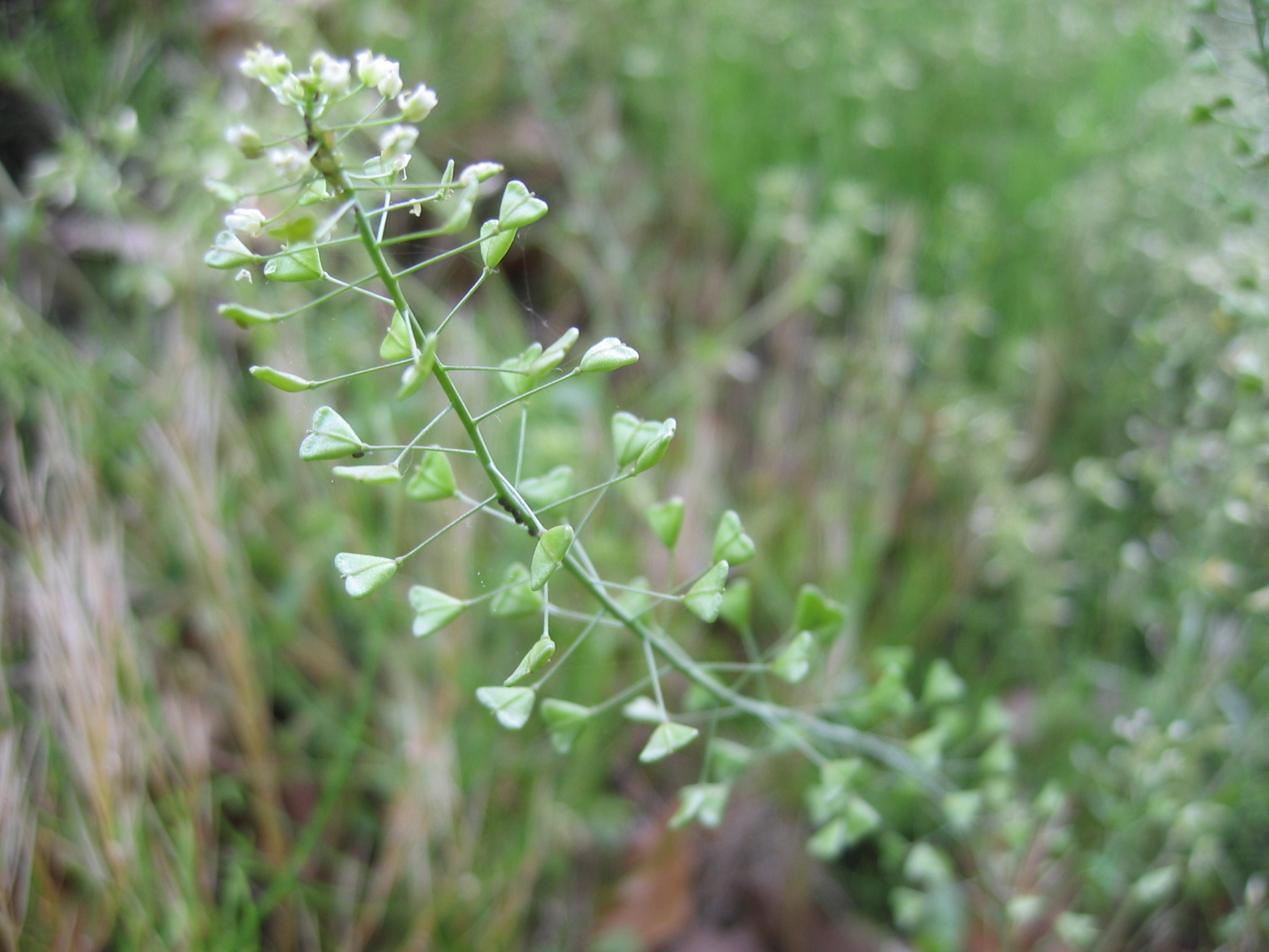 ナズナ (学名:Capsella bursa-pastoris) Canon IXY Digital 400